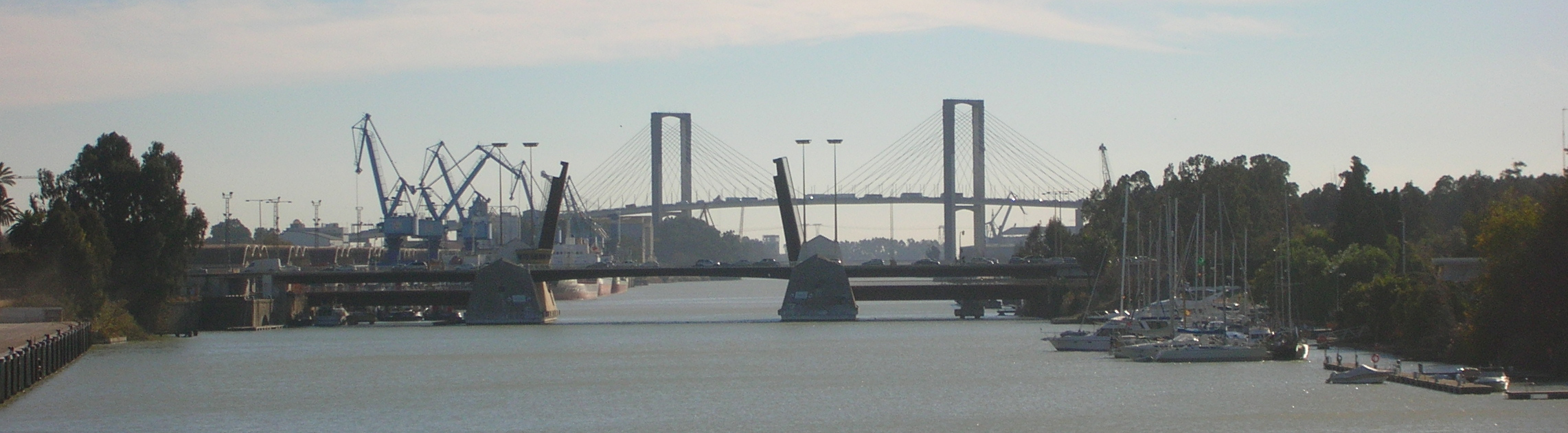 Vu du port de Séville, avec le Pont de las Delicias et, au fond, le Pont du 5ème Centenaire